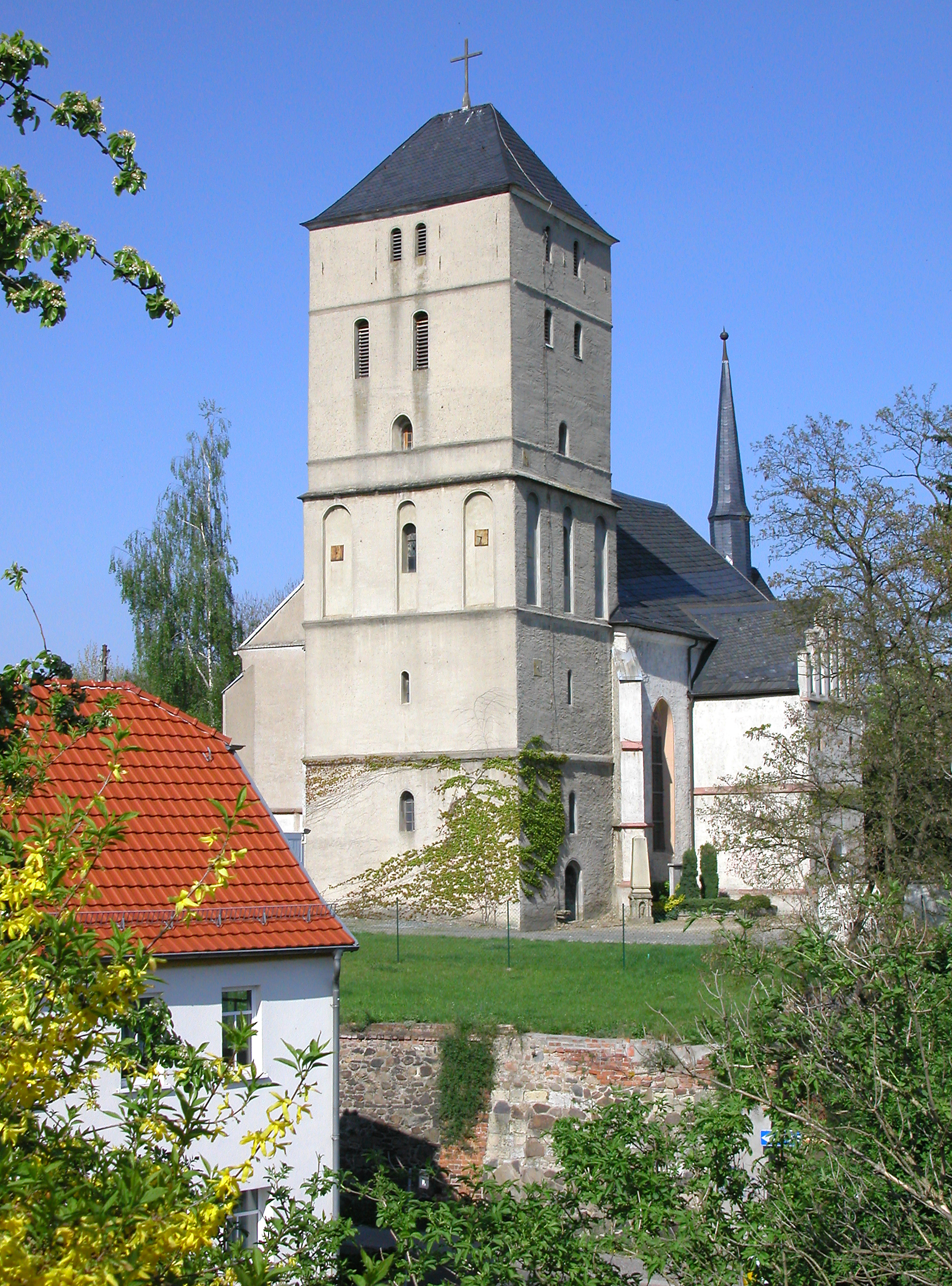 25.04.2009 04838 Eilenburg, Schloßberg: Bergkirche St. Marien (GMP: 51.458225,12.621799). Dreischiffige spätgotische Backstein-Hallenkirche (1516-1522). Nachweislich hat Martin Luther hier gepredigt.[DSCN36810.TIF]20090425475DR.JPG(c)Blobelt